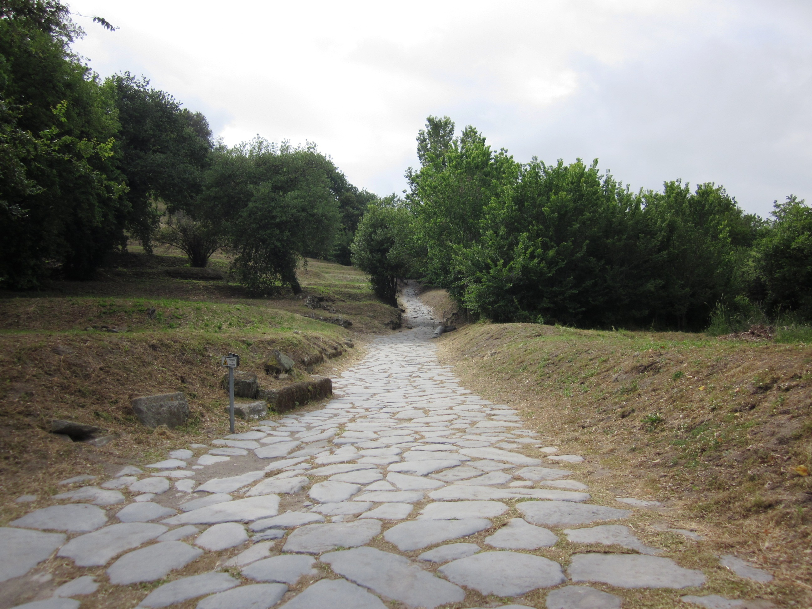 Parco archeologico di Cuma This is a photo of a monument which is part of cultural heritage of Italy.